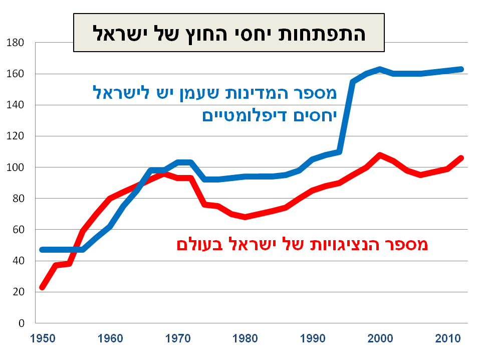 מספר הנציגויות של מדינת ישראל לאורך השנים, בהשוואה למספר המדינות שעמן קיימה יחסים דיפלומטיים. מתבסס על נתוני מדד הדיפלומטיה הישראלית 2014